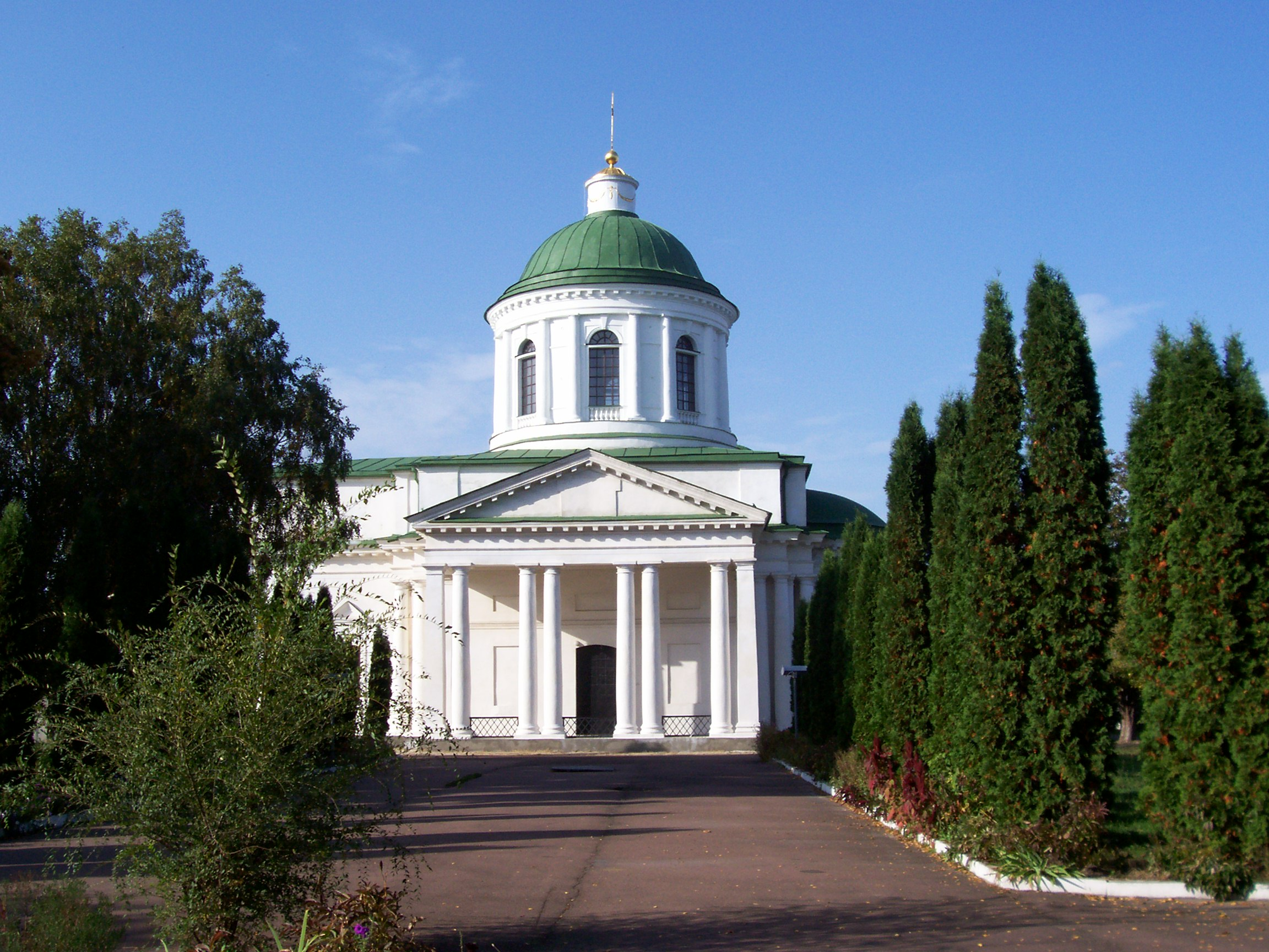 Всіхсвятський грецький собор у Ніжині